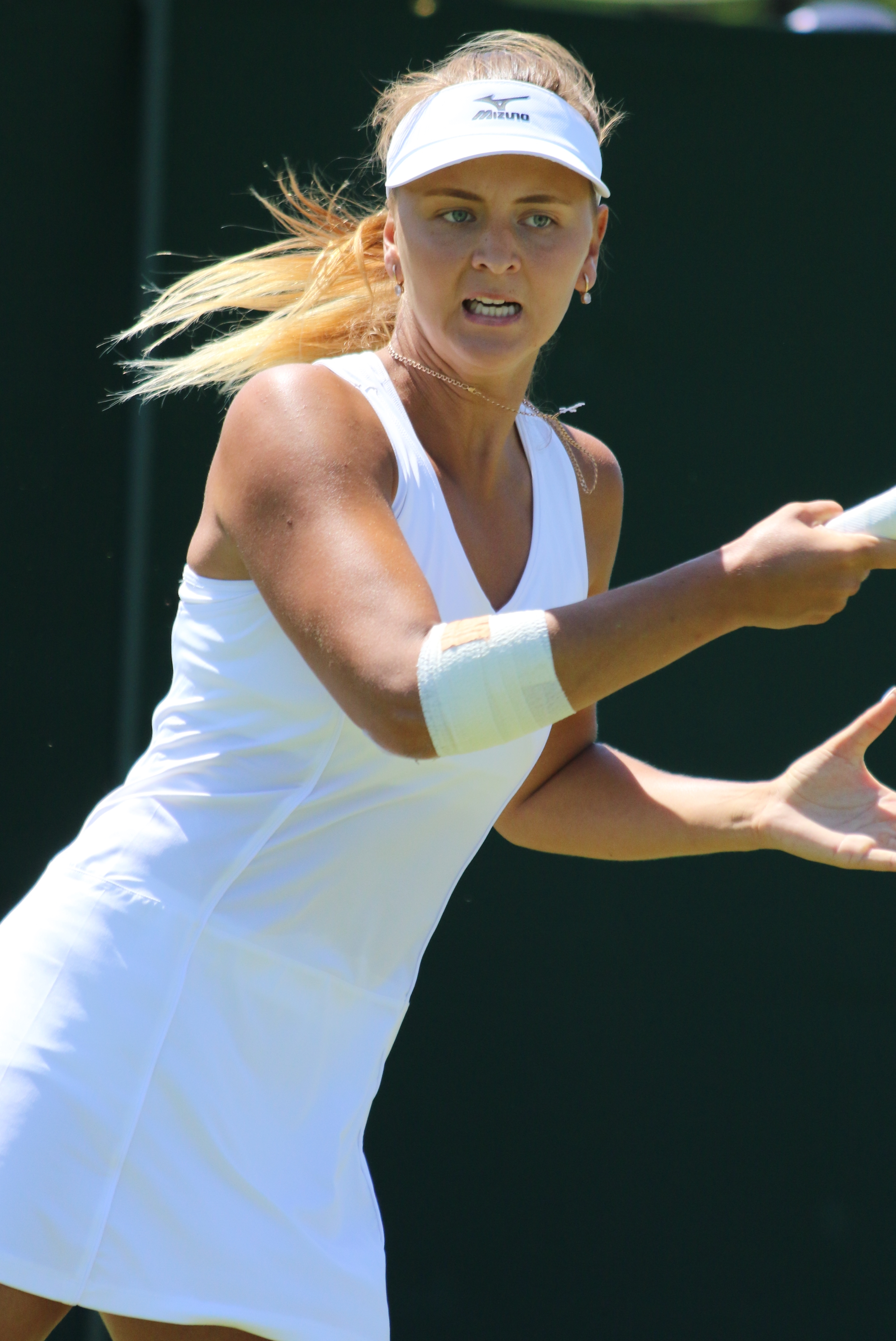 Zanevska WMQ18 (10)